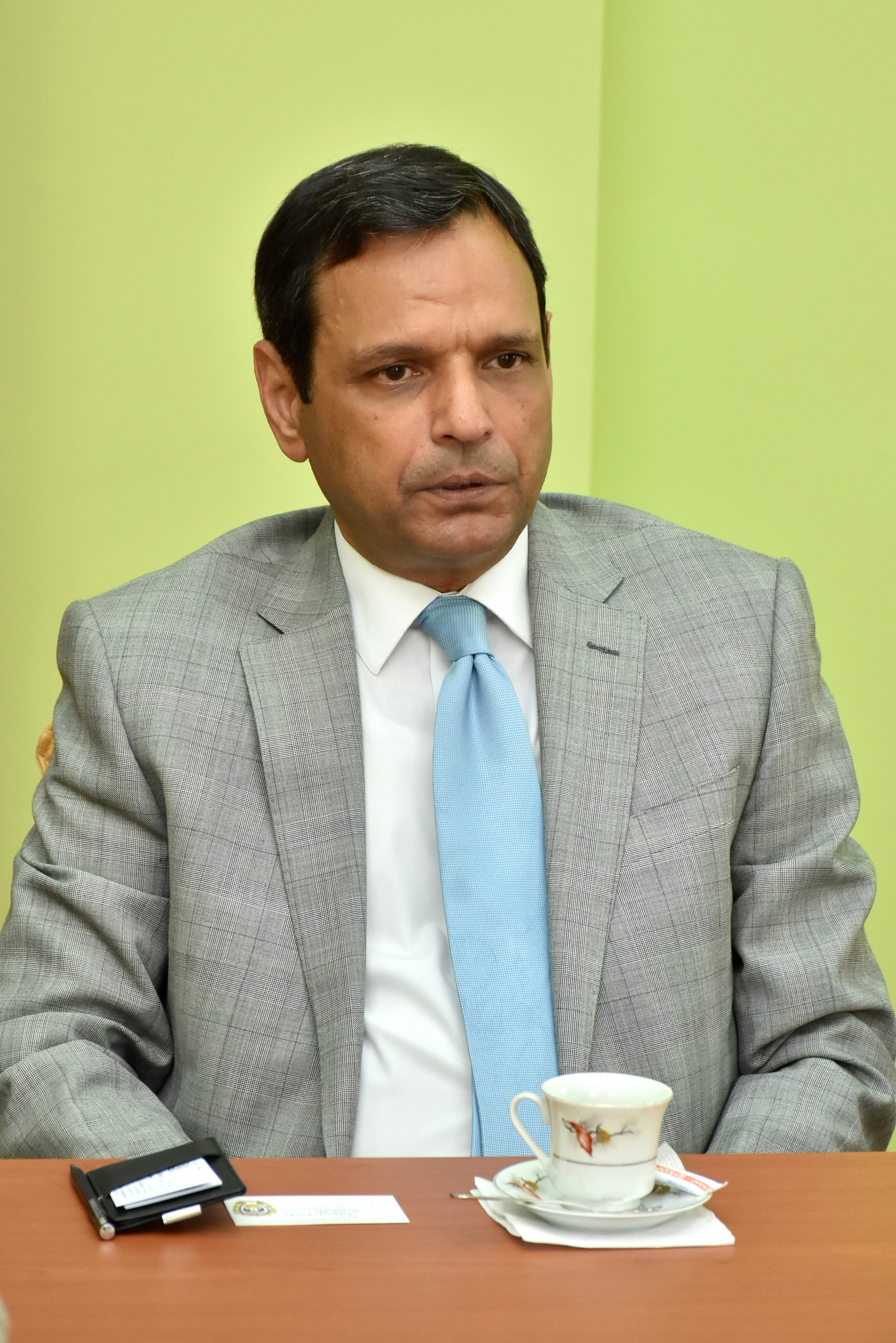 Надзвичайний і Повноважний Посол Пакистану в Україні Атар Аббас із візитом у Тернопільському державному медичному університеті імені І. Я. Горбачевського.